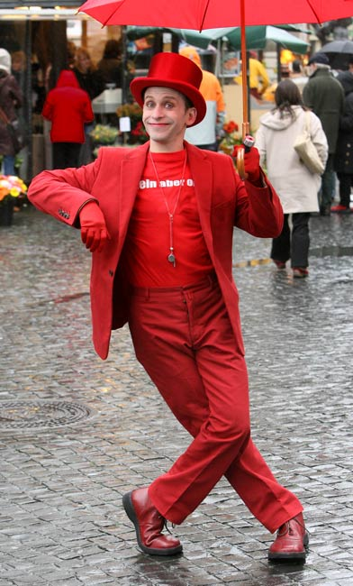 PANTOMIME PABLO ZIBES; durante una actuación en Alemania